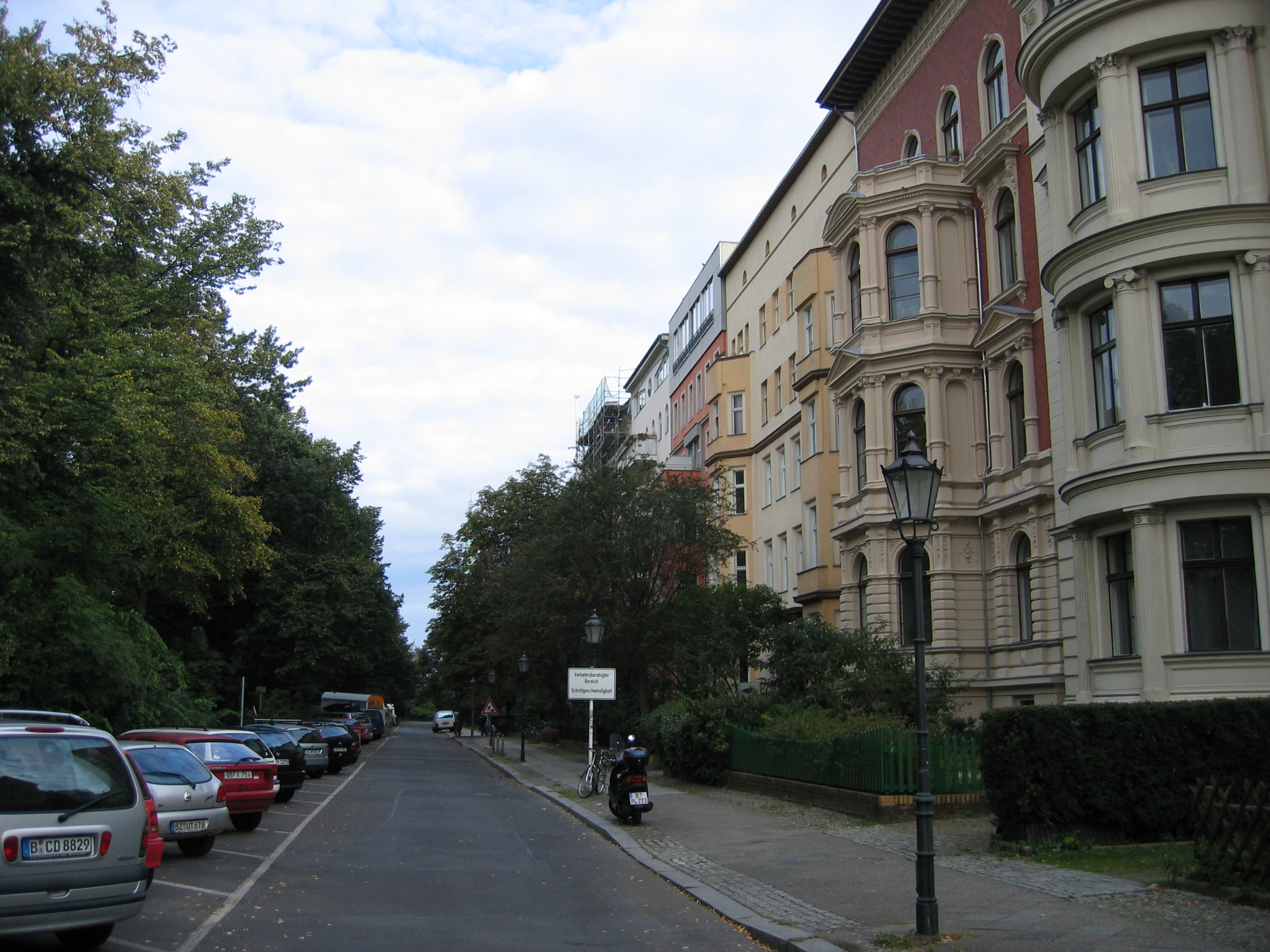 Hornstraße in Berlin-Kreuzberg